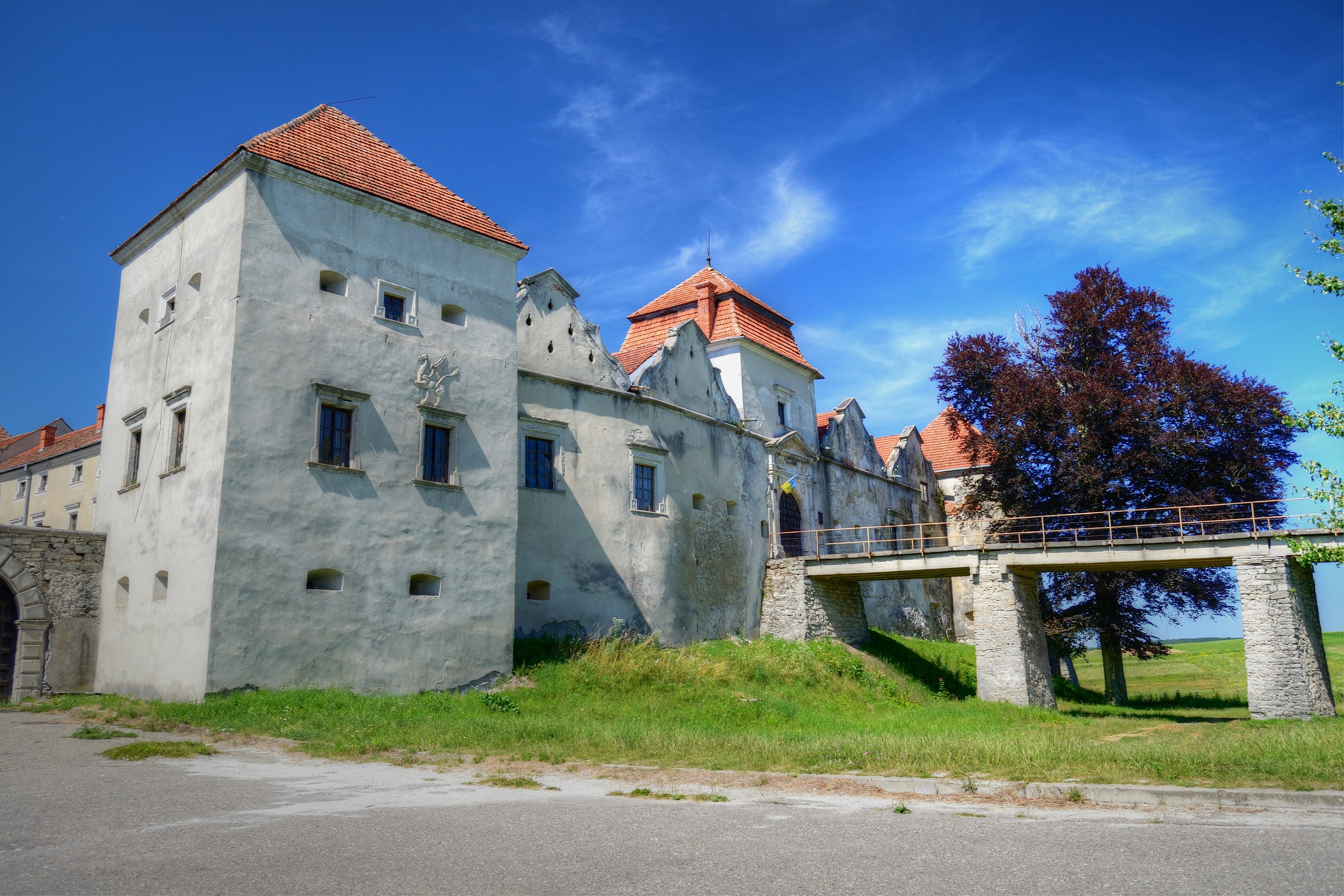 Фасад